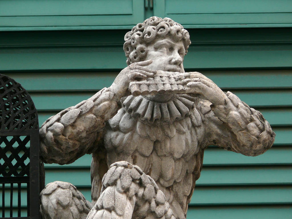 Papagenotor, detail